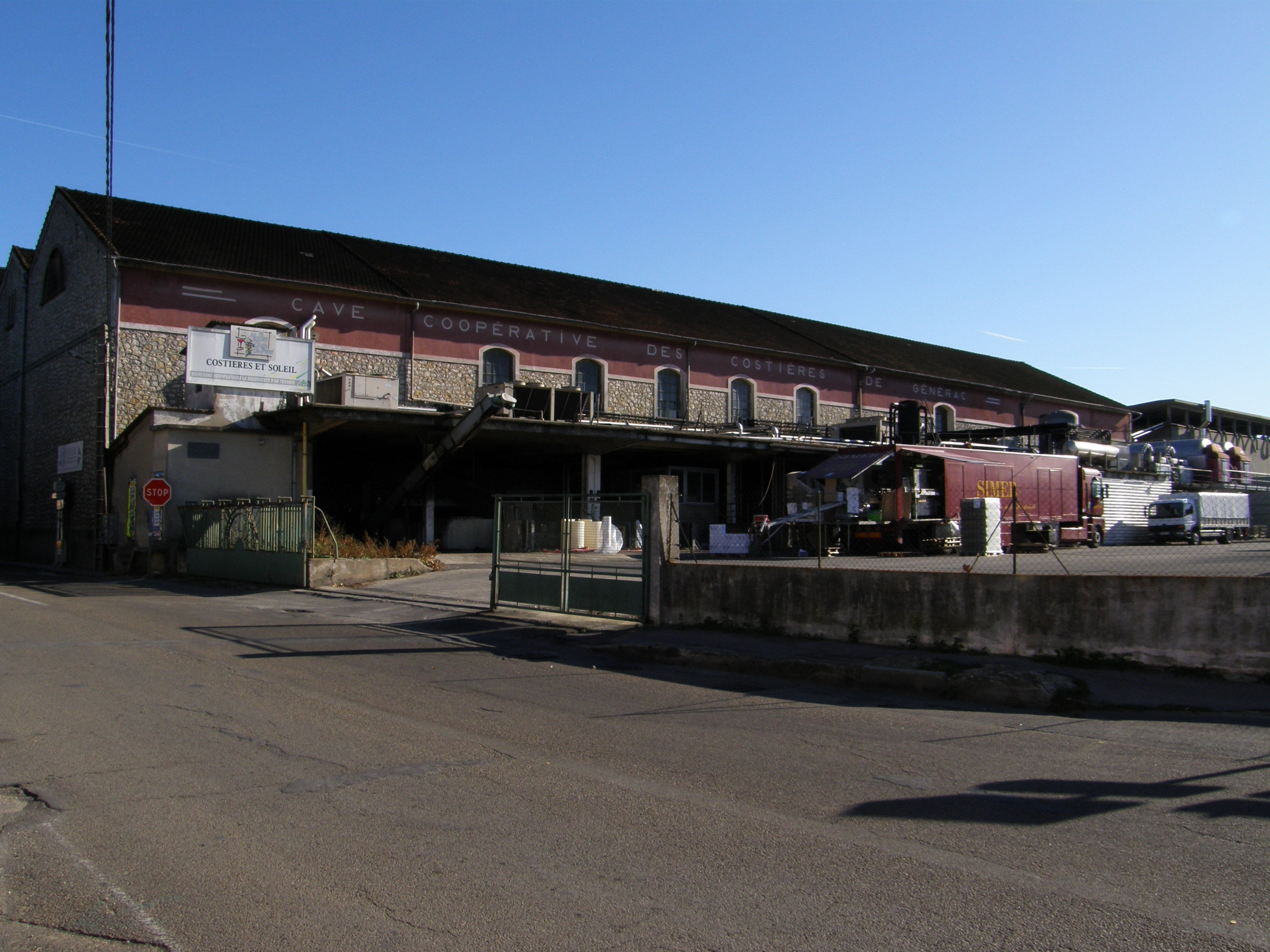 Cave coopérative vinicole de Générac (Gard, France)